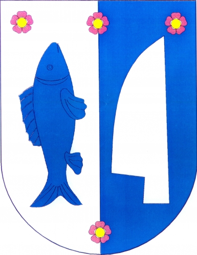 Znak, Hevlín, okres Znojmo